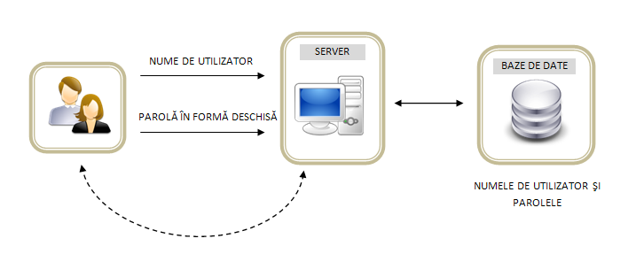 Reprezentarea grafică a procesului de autentificare tradițională